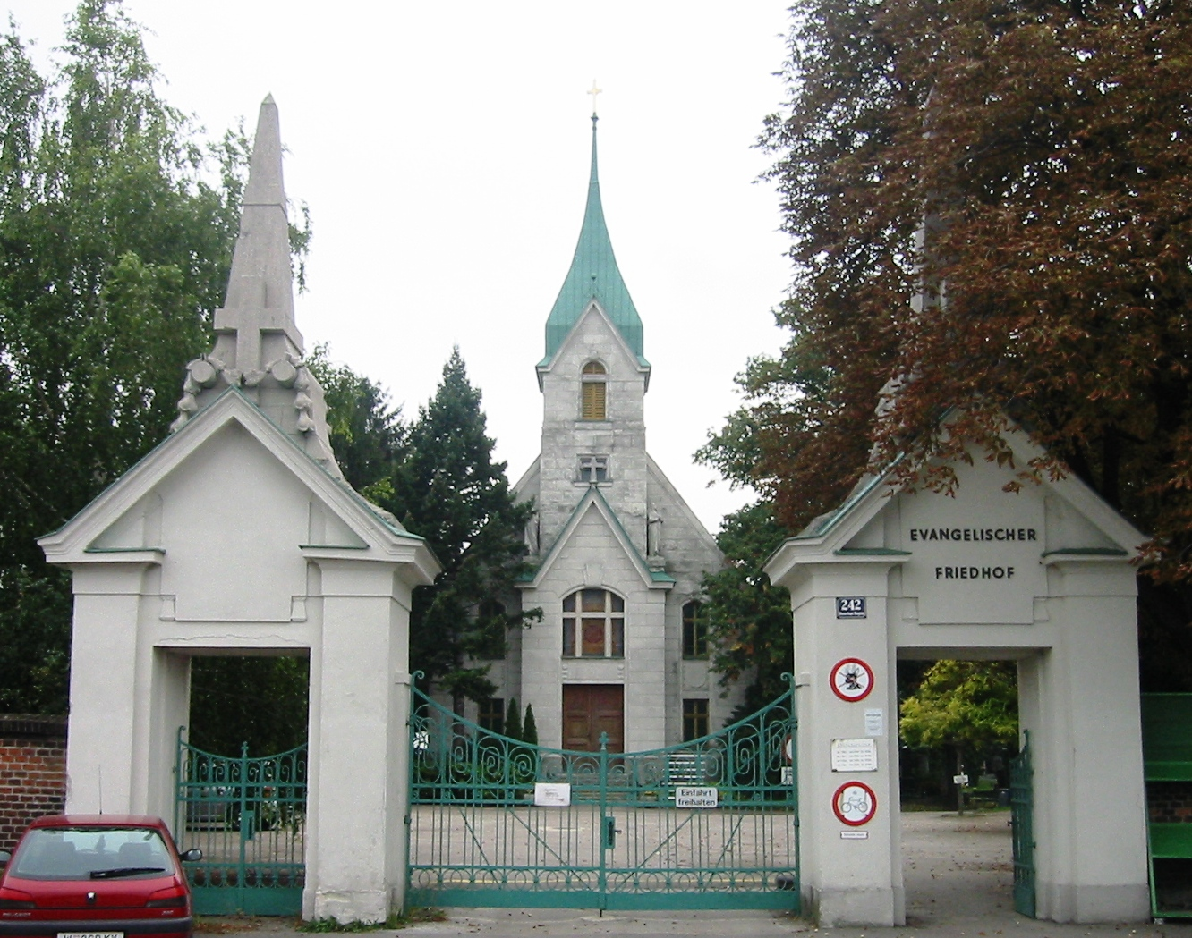 Wiener Zentralfriedhof, Evangelischer Friedhof